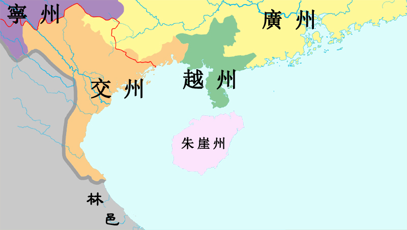 南朝齊時期的交州（497年），參考譚其驤《中國歷史地圖集》